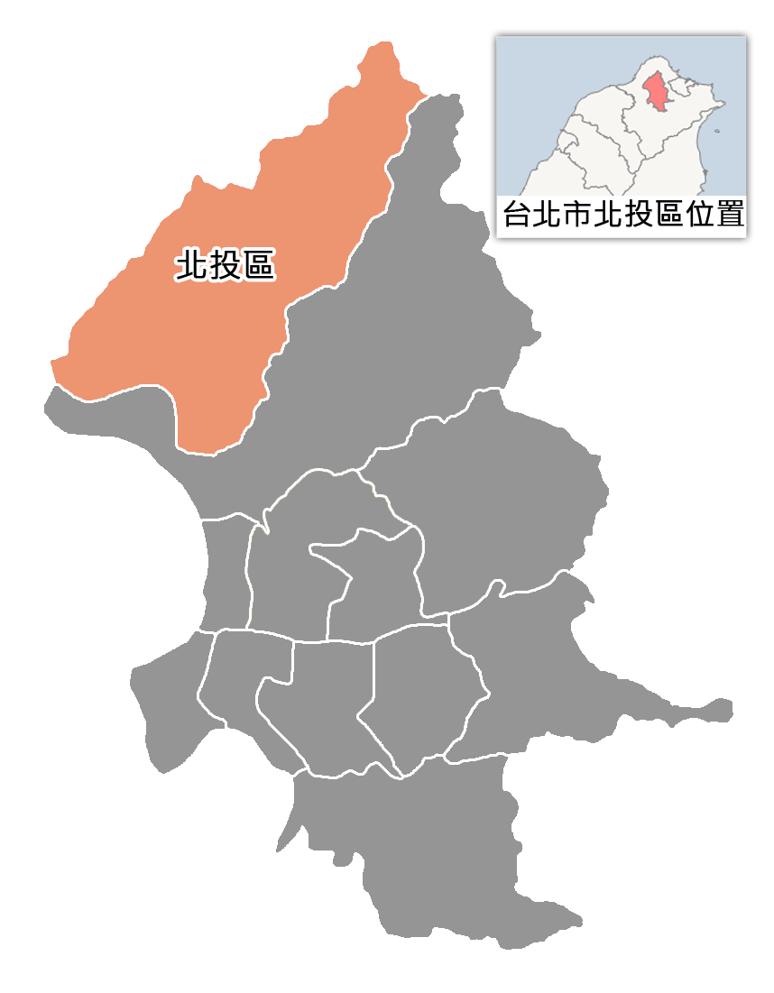 台北市北投區位置。